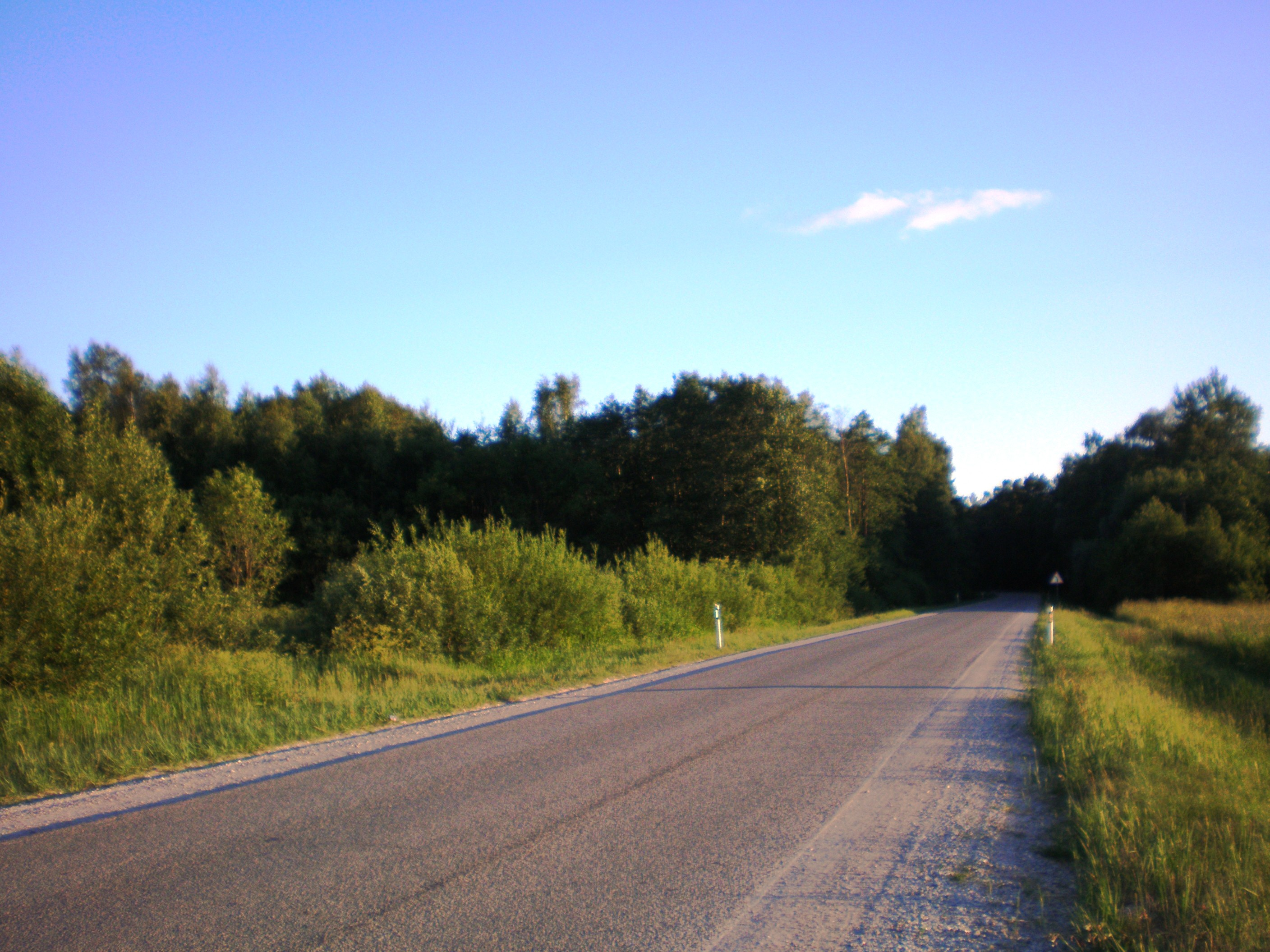 Kelias Vabalninkas-Paliūniškis (KK191) Biržų rajone